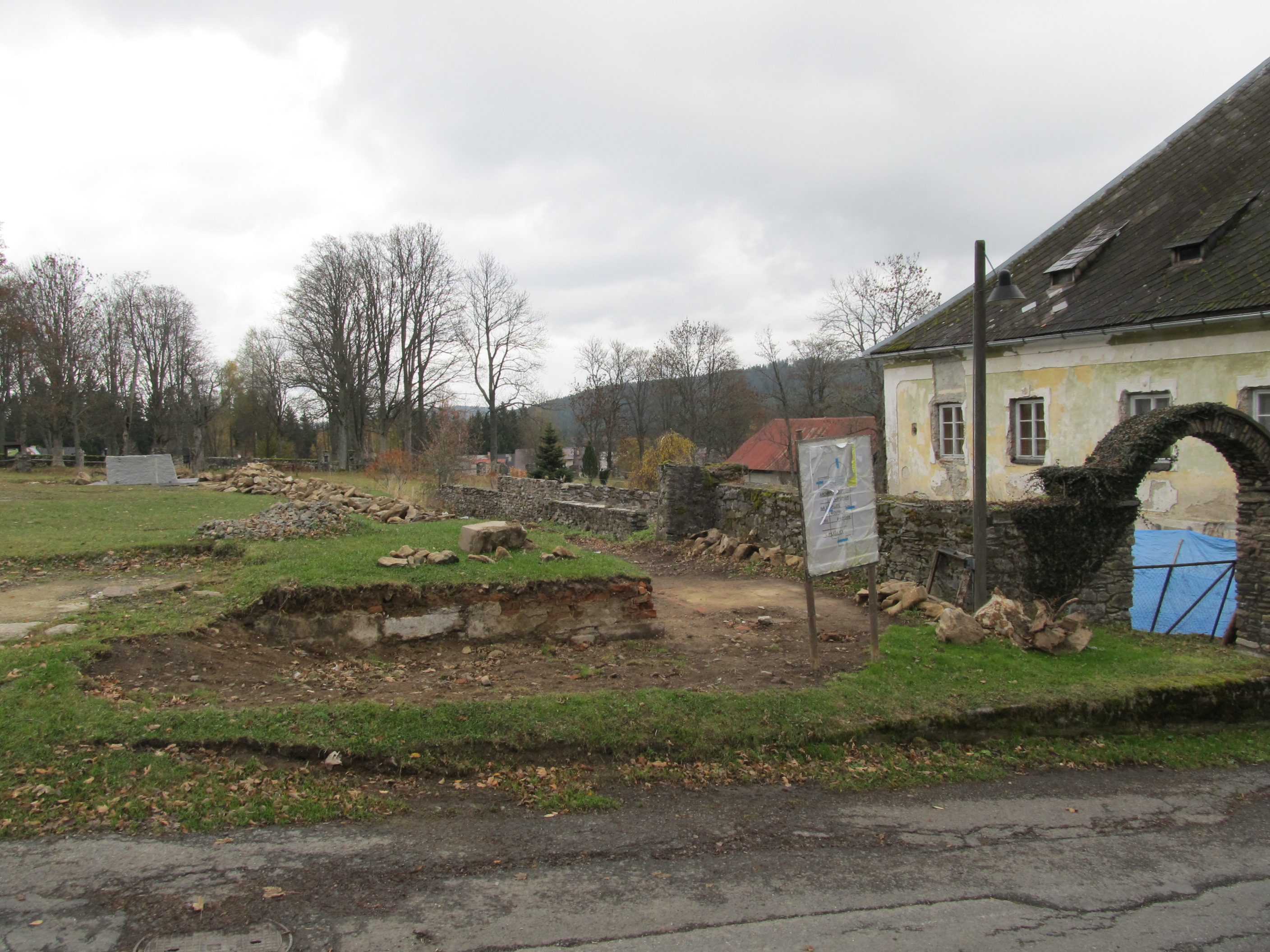 Prášily - vykopávky kostela svatého Prokopa (odstřelen 4. 1. 79)